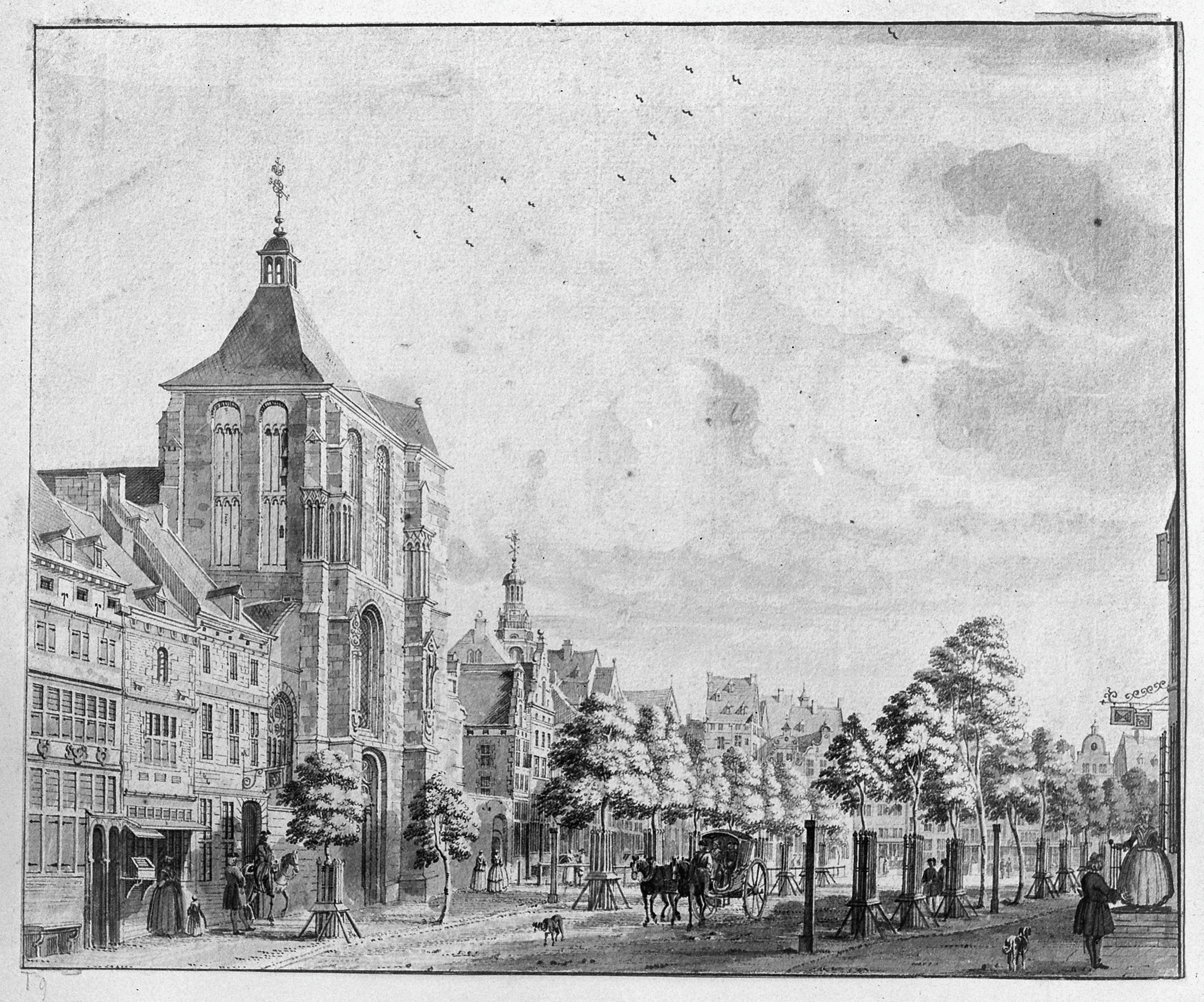 Matthiaskerk: Foto van tekening kerk (opmerking: Naar O.I. inkttekening van J. de Beijer)